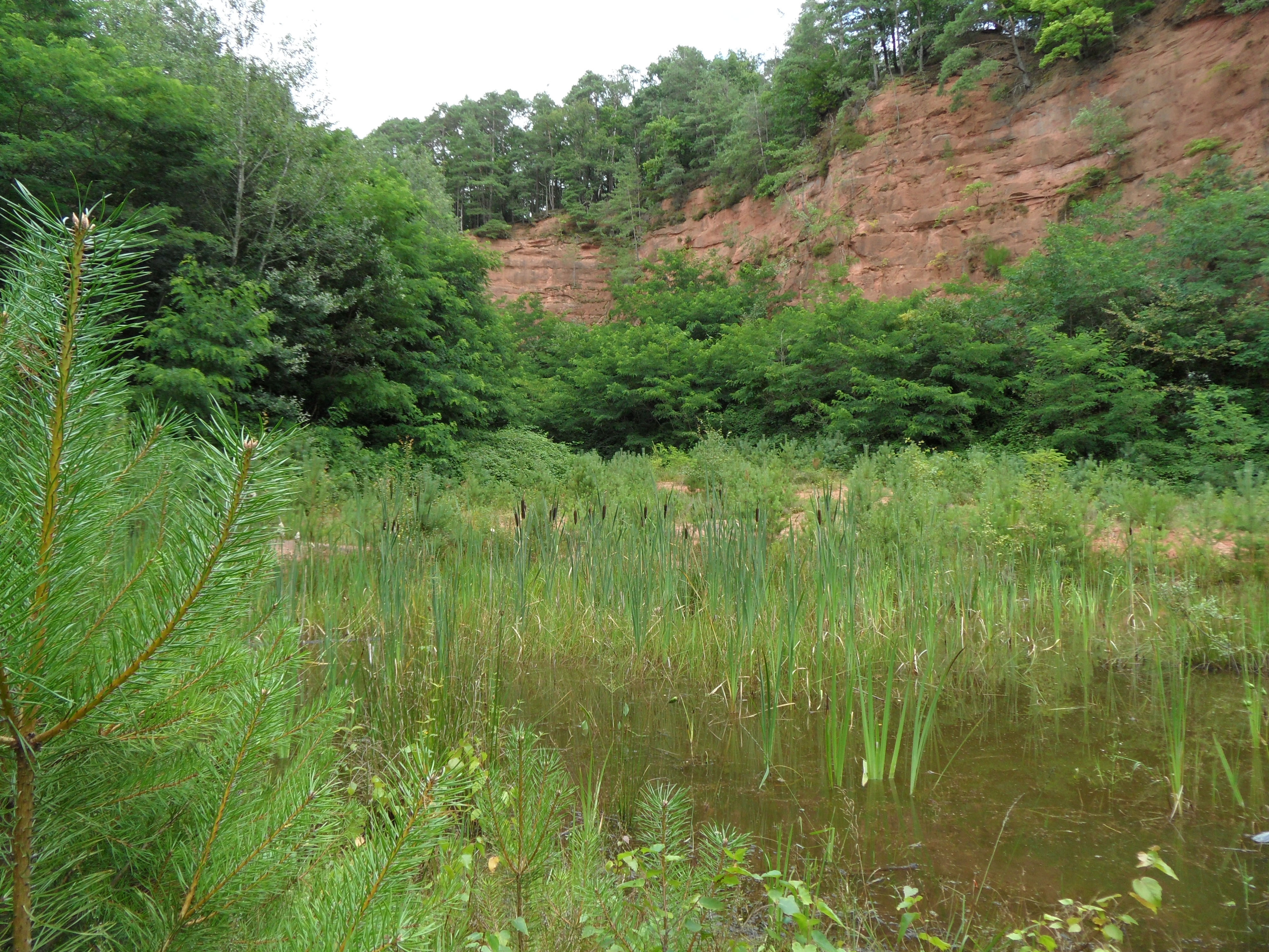 Die Sandgrube am Heidenberg, bekannt als Kessel von Schwedelbach, ein flächenhaftes Naturdenkmal; es handelt sich um ein Feuchtbiotop in einer ehemaligen Formsandgrube. Nummer des Naturdenkmals: ND-7335-274